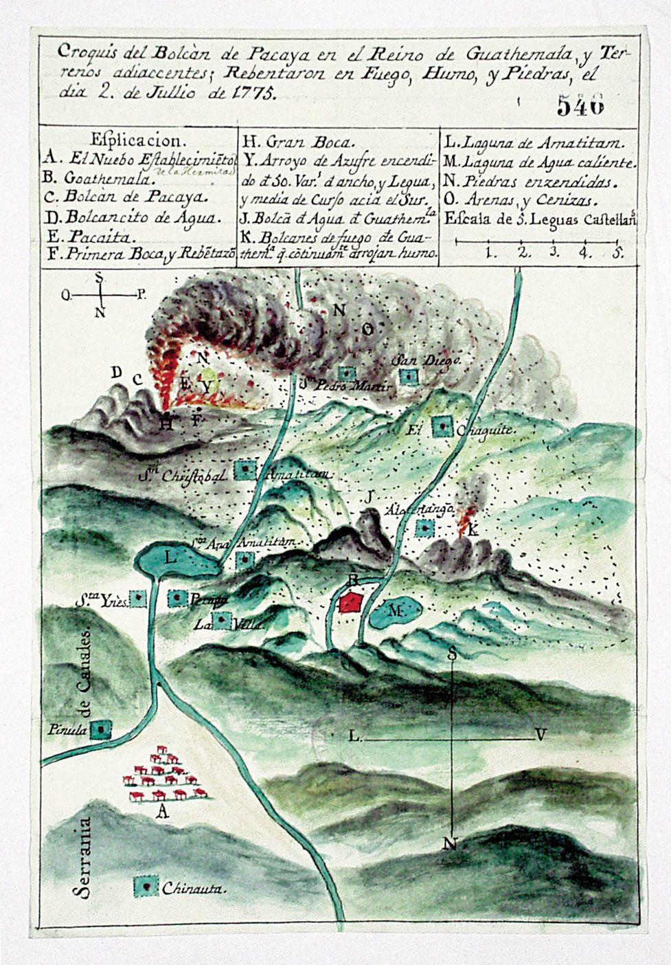 Plano manuscrito titulado Croquis del Bolcán de Pacaya en el Reino de Guathemala, y terrenos adiaccentes. Rebentaron en Fuego, Humo, y Piedras, el día 2 de Jullio de 1775, que representa la erupción del volcán de Pacaya. Conservado en la Real Academia de la Historia.